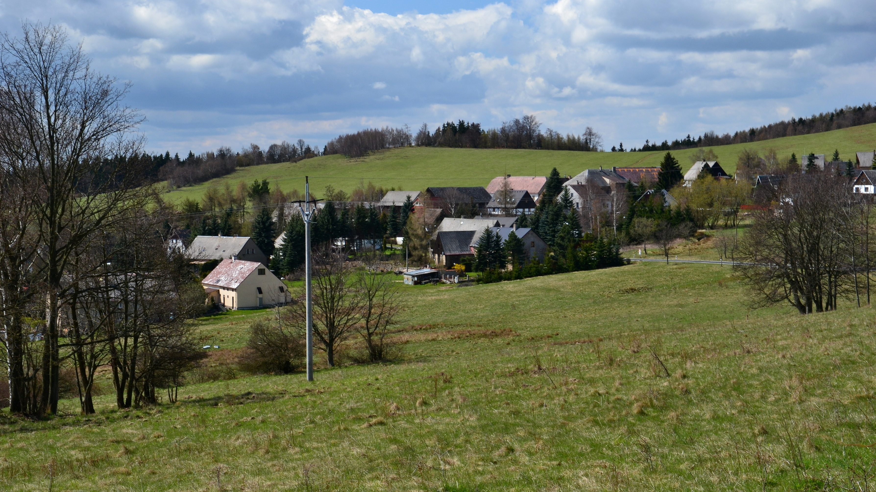 Celkový pohled ze severovýchodu